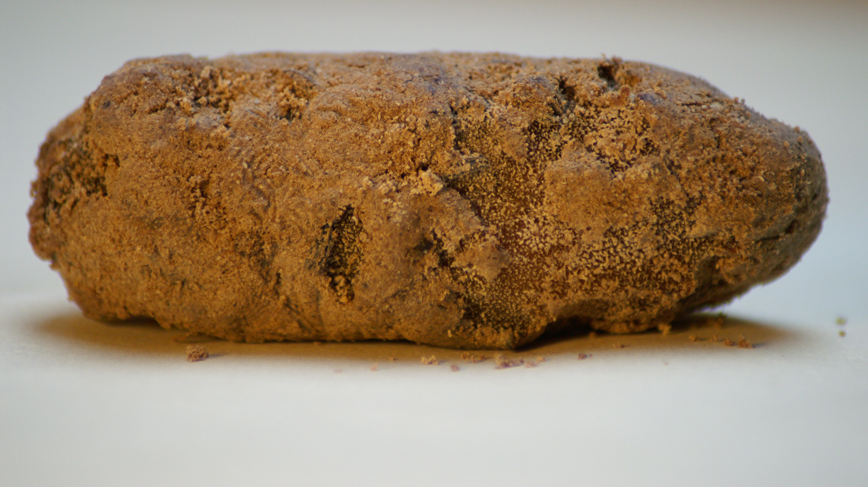 Milbenkäse (mite cheese)